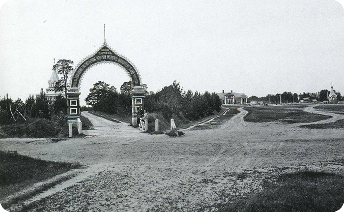 Александровское убежище в Москве. Въездные ворота.